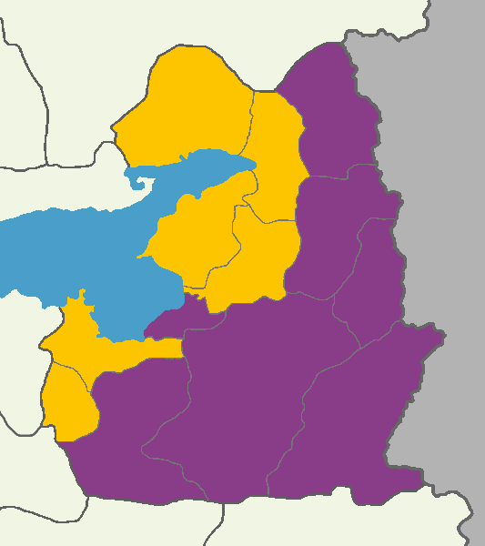 Van'da 2014 Türkiye cumhurbaşkanlığı seçimi